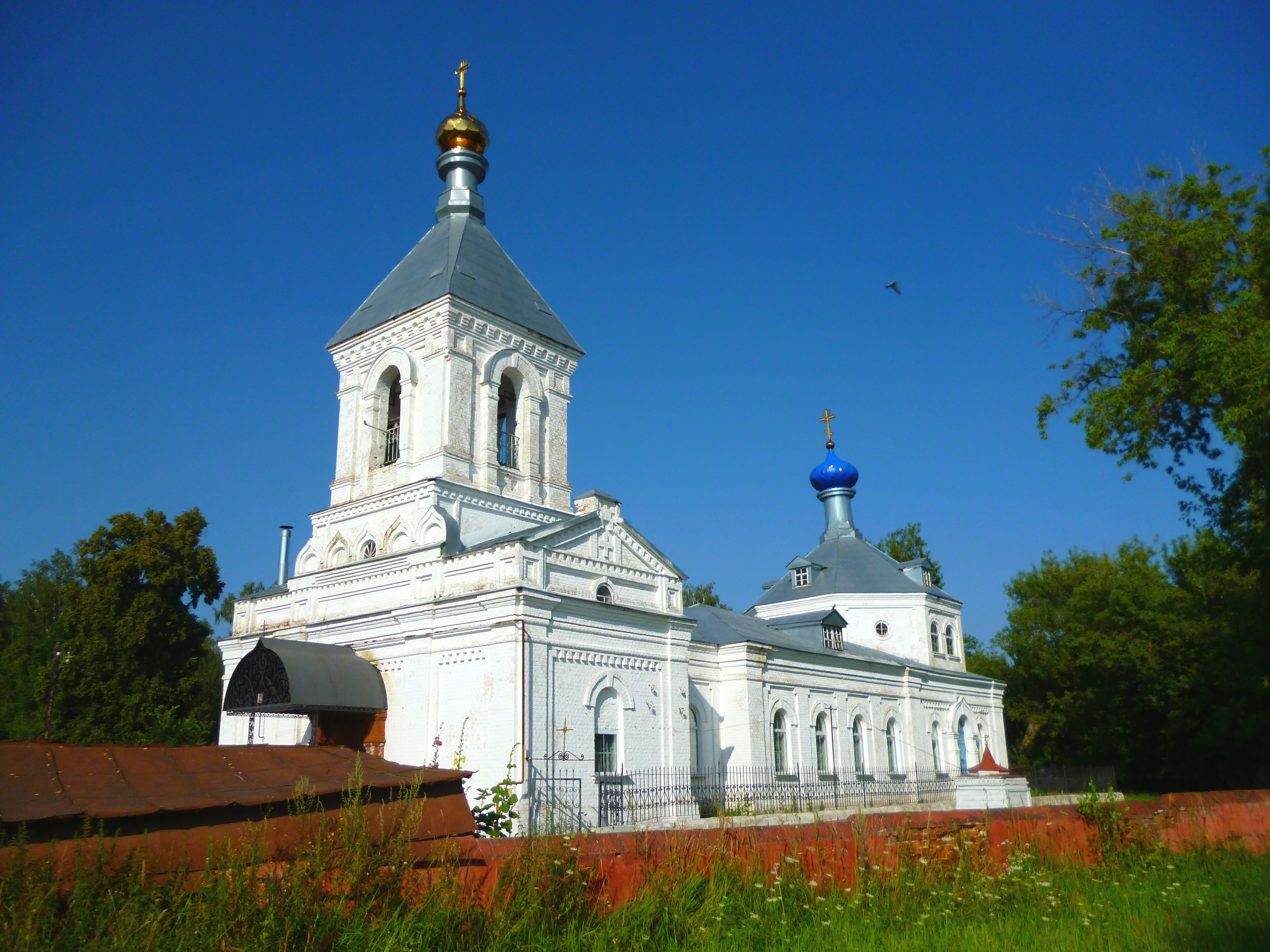 Рязанская обл., Шиловский р-н. Казанская церковь села Срезнево.